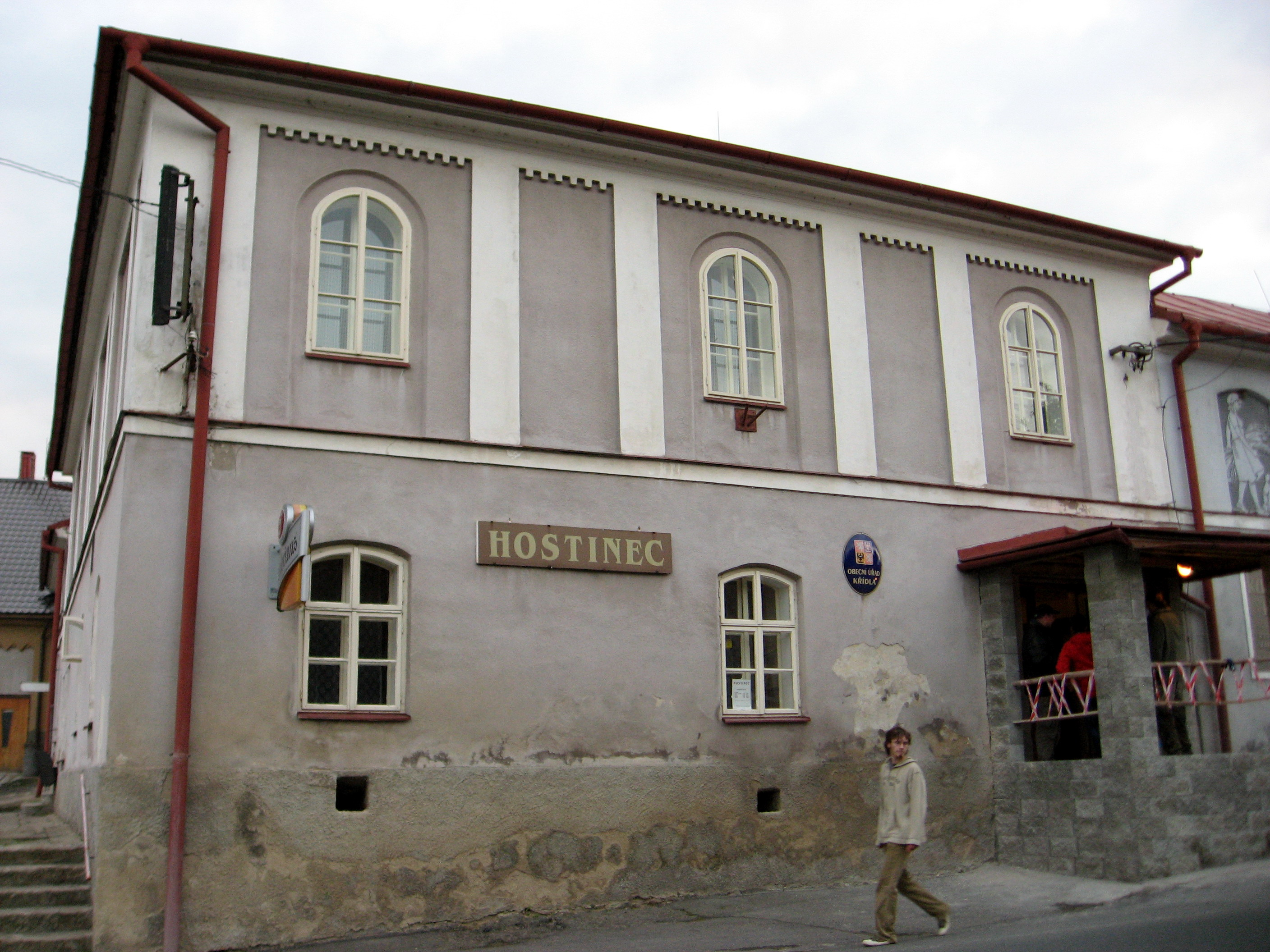 Křídla, hospoda a obecní úřad